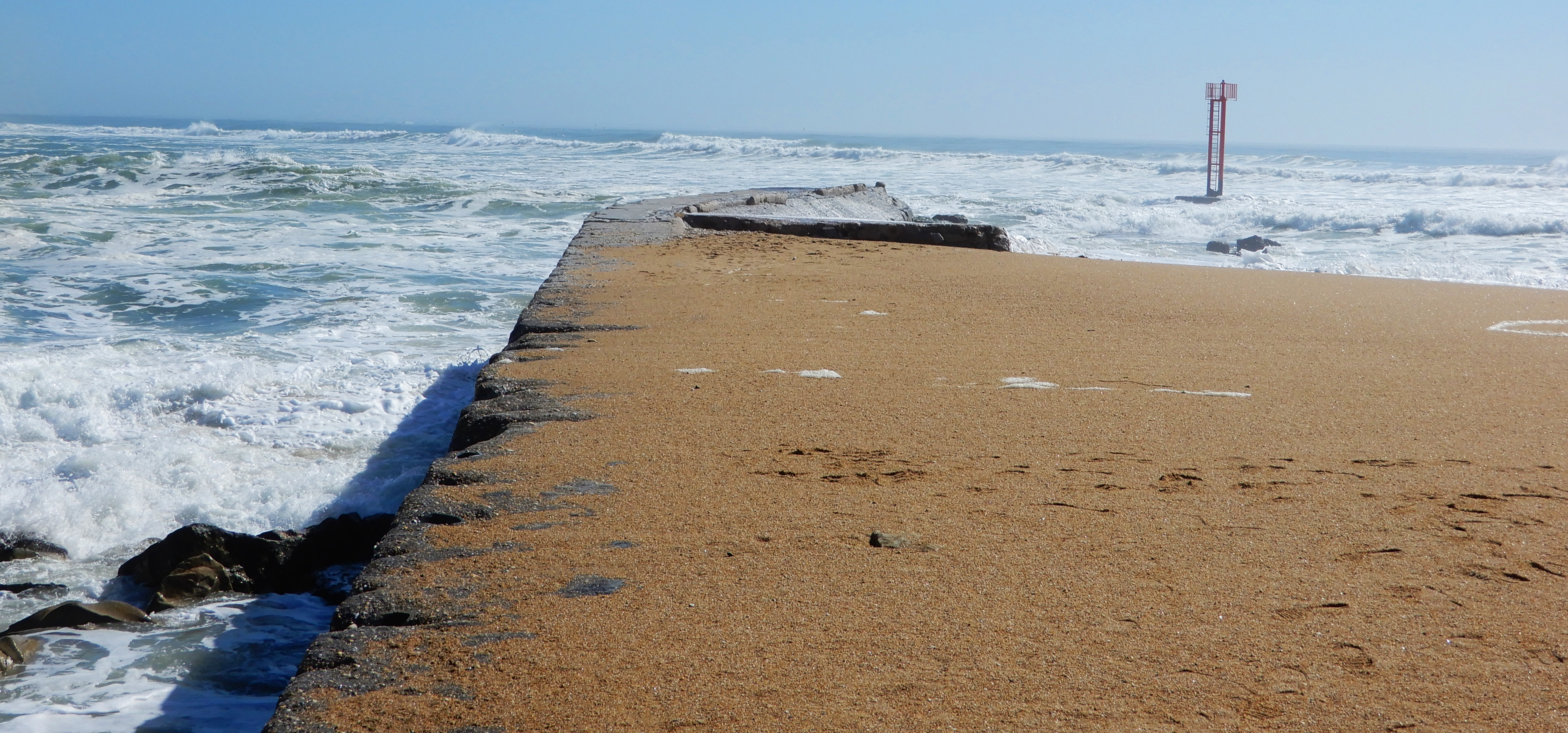 Plouhinec - Entrée de la Ria